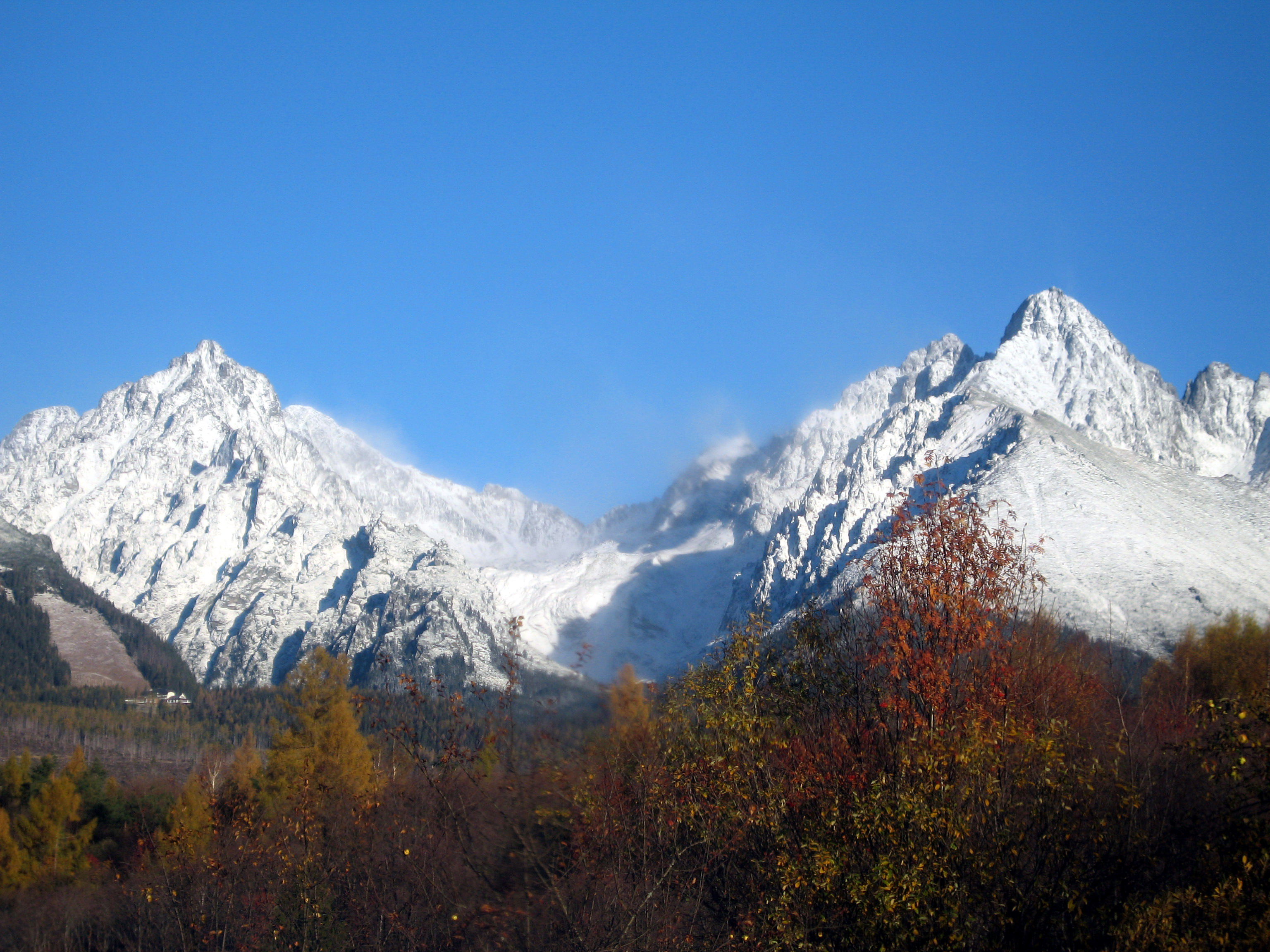 Kalnai.